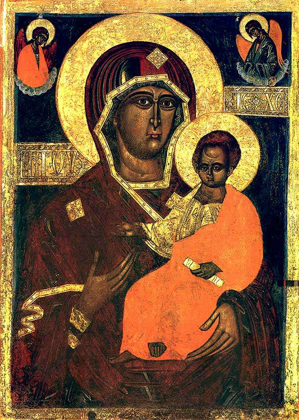 Маці Боская Адзігітрыя Смаленская. 16 ст. Фрагмент. Дошка, яечная тэмпера. 120х85х3. Беларуская школа. Дзяржаўны мастацкі музей БССР. Выяўлены 3-й и 32-й экспедыцыямі Дзярж. маст. музея БССР у 1958 і 1977 гадах у Прачысценскай царкве (XVIII ст.) с. Дубянец Столінскага раёна Брэсцкай вобл. Раскрыты рэстаўратарам Спецыяльных навукова-рэстаўрацыйных вытворчых майстэрань Міністэрства культуры БССР А.С. Шпунтом у 1978-1979 гг.